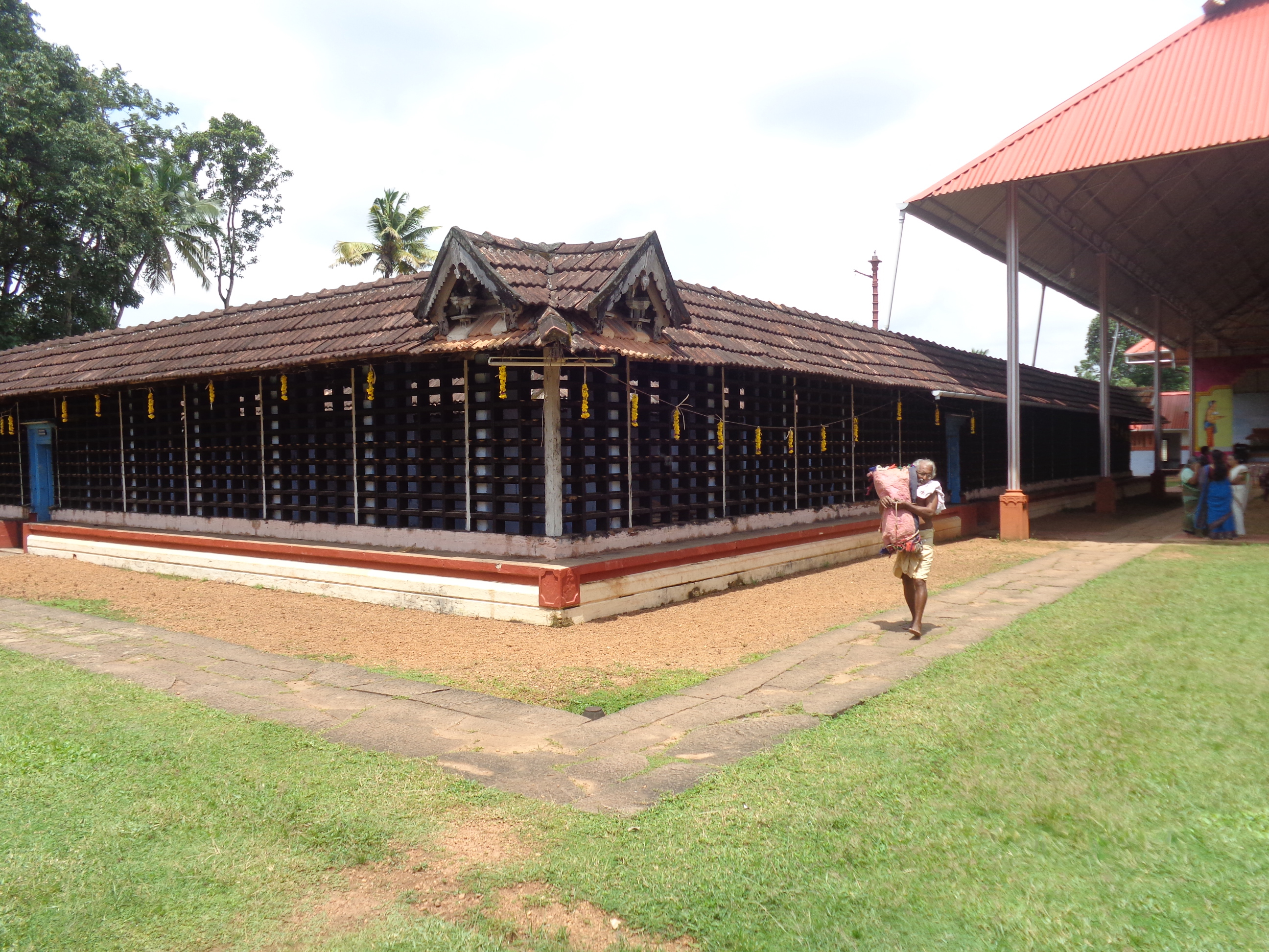 side viewof onamthuruth krishana temple, neendoor, kottayam